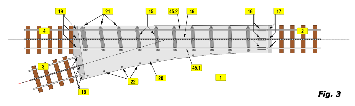 GLEISWEICHE / TRACK POINTS / AIGUILLAGE: RIGI-VTW 2000 Europäisches Patentamt / EUROPÄISCHE PATENTSCHRIFT / EP 1 214 473 B1 / 20.07.2005 Patentblatt 2005/29 / Anmeldenummer: 00958083.8 Anmeldetag: 18.09.2000 / Int Cl.7: E01B 25/06 / Internationale Anmeldenummer: PCT/CH2000/000502 Internationale Veröffentlichungsnummer: WO 2001/021894 (29.03.2001 Gazette 2001/13)